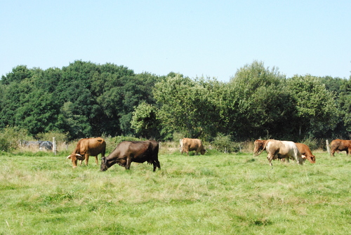 es una foto